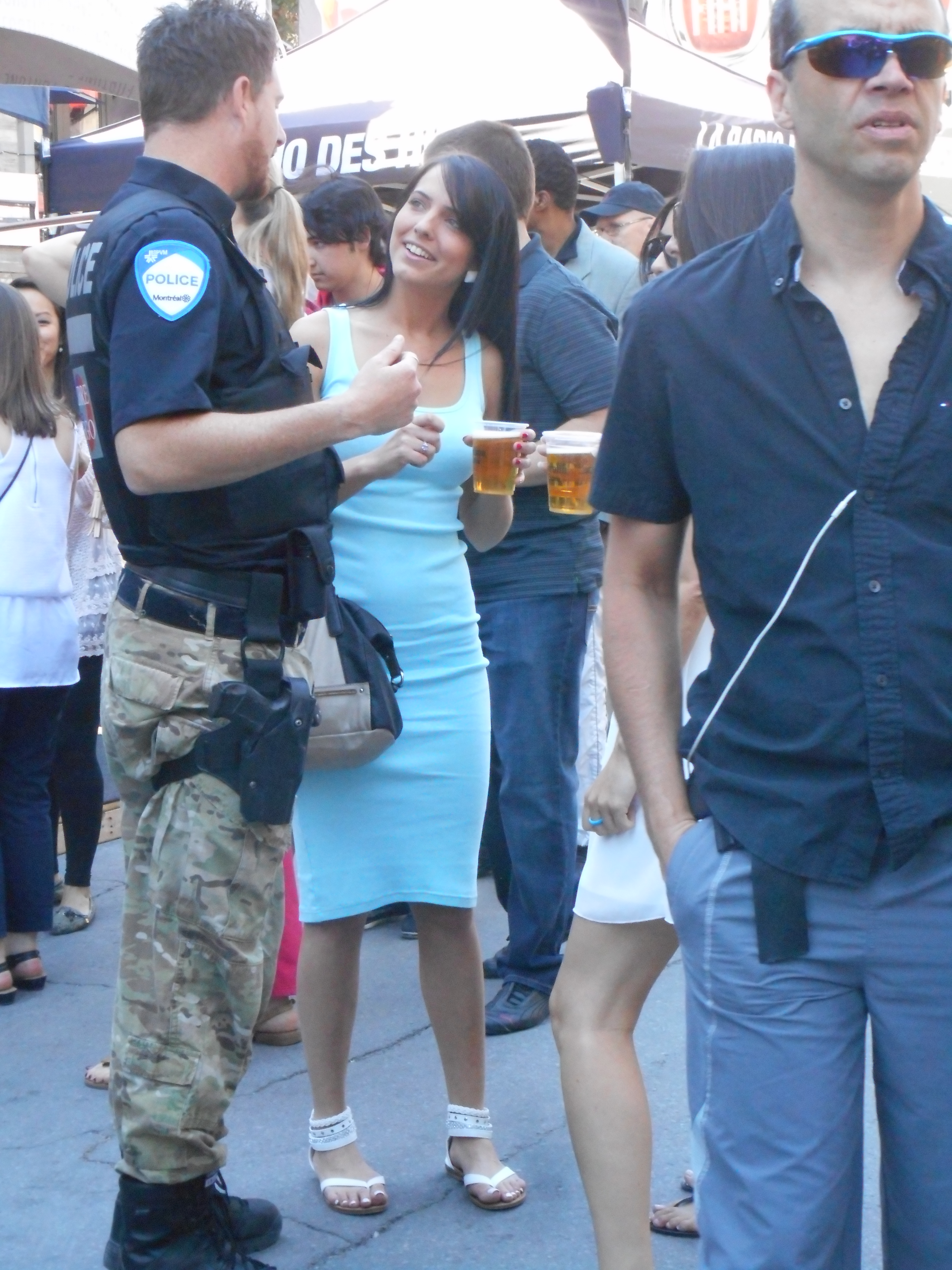 Festival du Grand Prix à Montréal pendant le Grand Prix du Canada